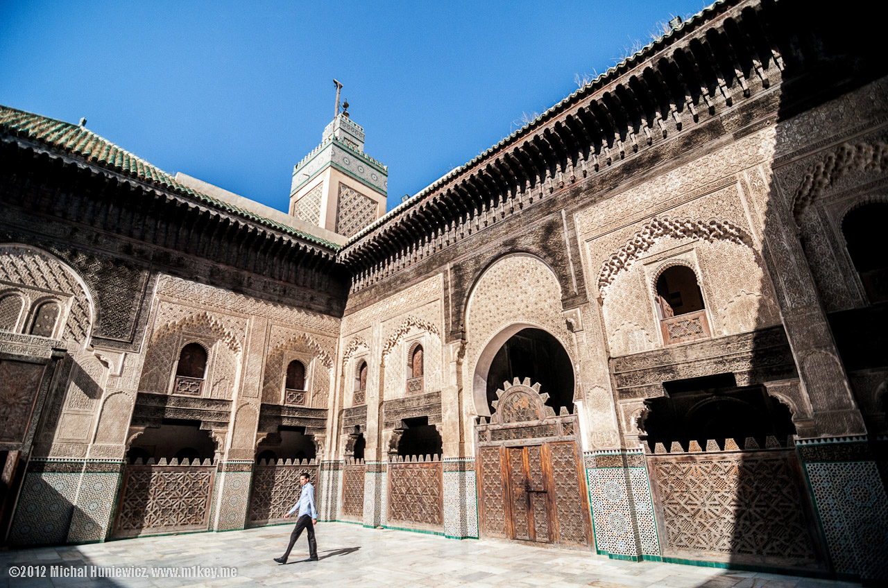 Bou Inania Madrasa